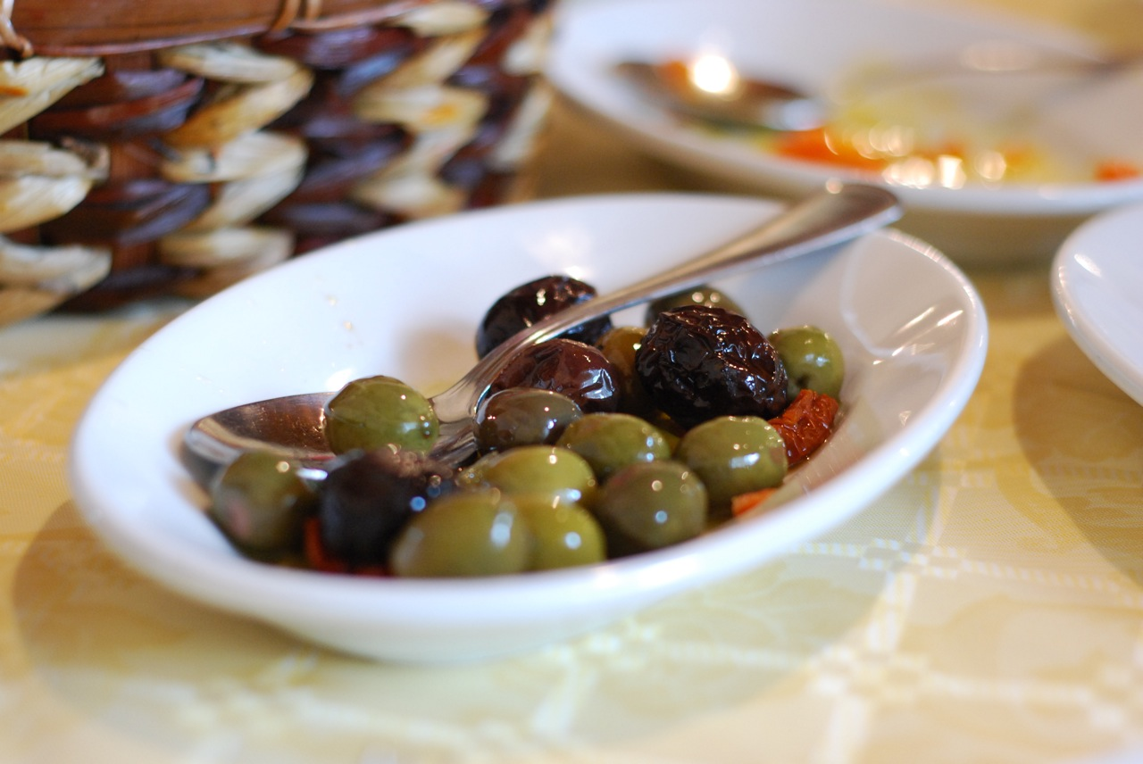 Olive siciliane